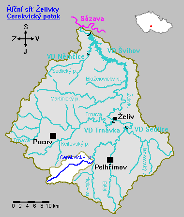 Říční síť Želivky - Cerekvický potok